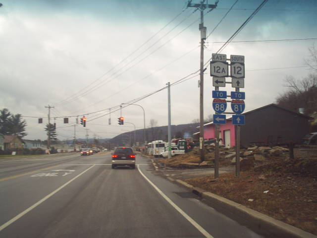 M3367S-4504